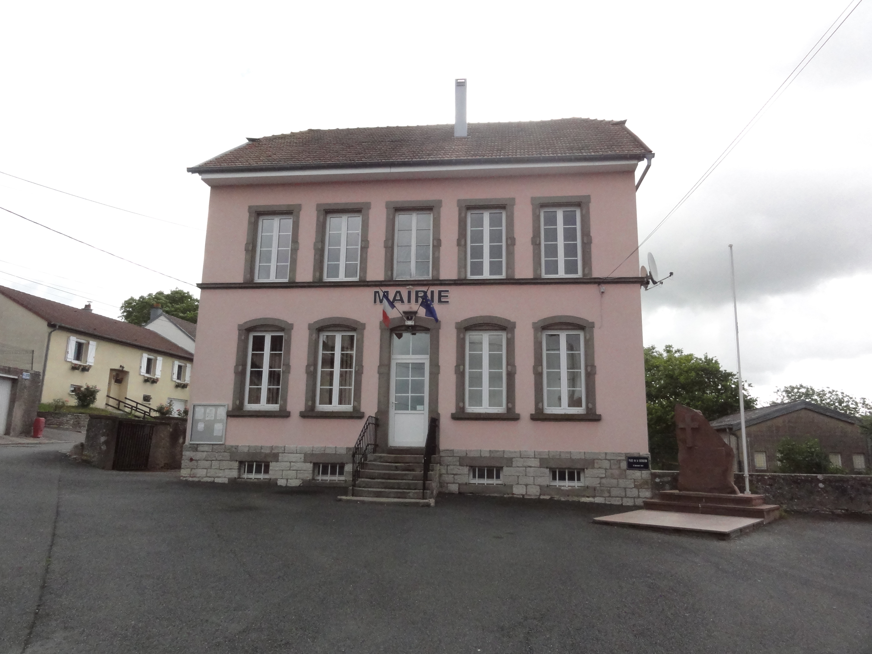 Oberstinzel (Moselle) mairie